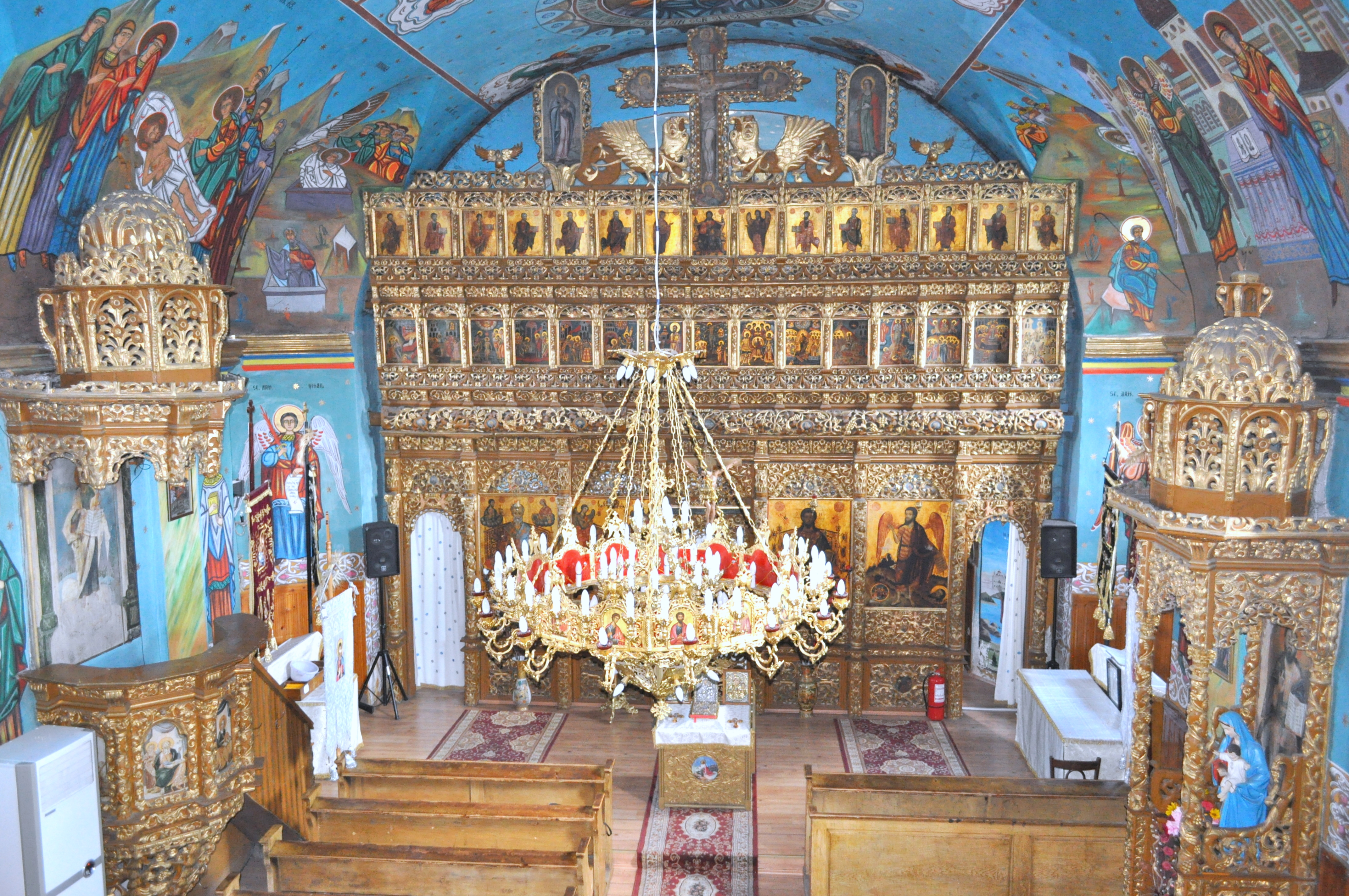 Biserica ortodoxă „Sf. Arhangheli Mihail și Gavriil”, sat Vadu Crișului; comuna Vadu Crișului